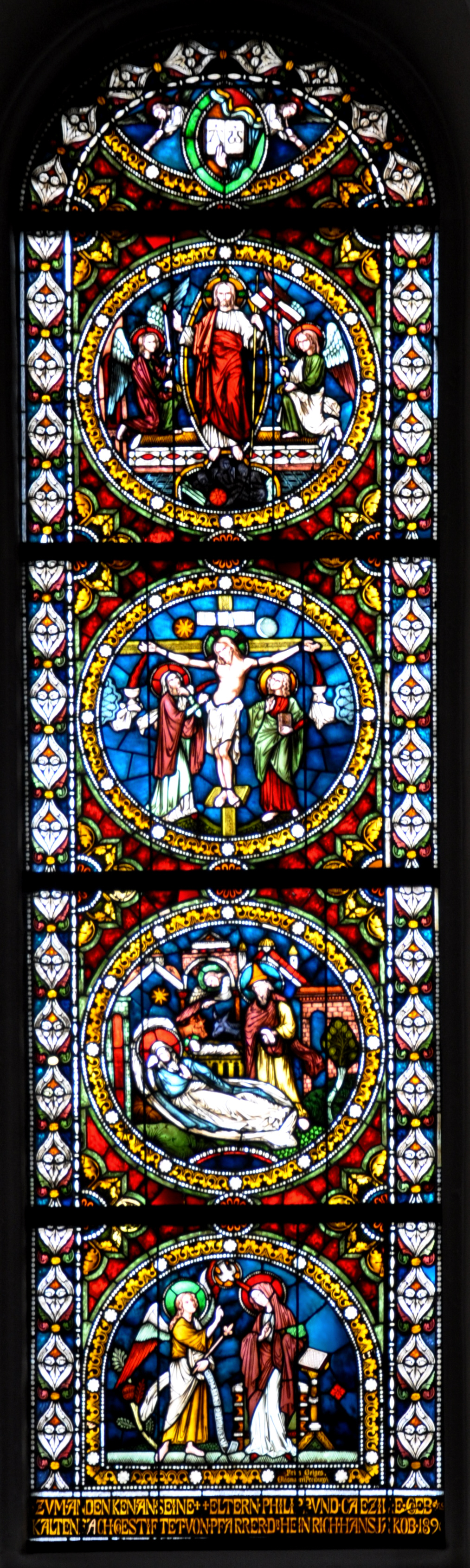 Haslach im Kinzigtal, katholische Pfarrkirche St. Arbogast, neuromanisches Christusfenster an der Südseite des Langhauses (Mariä Verkündigung, Christi Geburt, Kreuzigung, Auferstehung, A und O mit posaunenblasenden Engeln), Widmung: Zum Andenken an seine Eltern Philipp vnd Caezilie geb. Kaltenbach. Gestiftet von Pfarrer Dr. HHeinrich Hansjakob 189[6?]; signiert Fritz Geiges Glasmalerei Freiburg